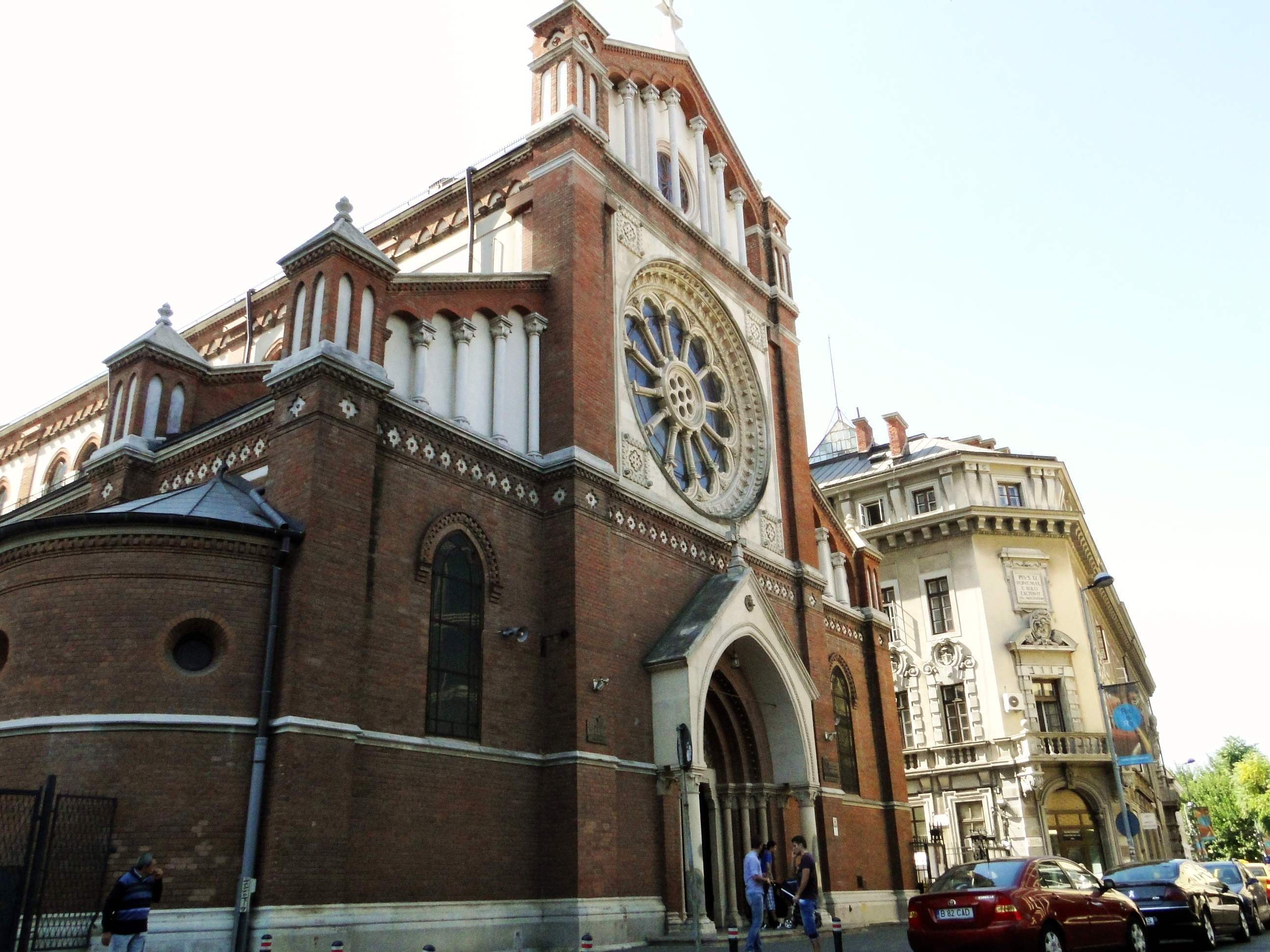 Catedrala romano-catolică „Sf. Iosif“